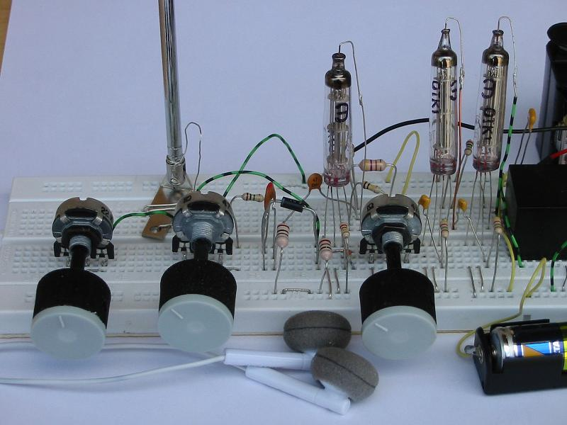 Batterieroehren-Audion 0v2 1j18b